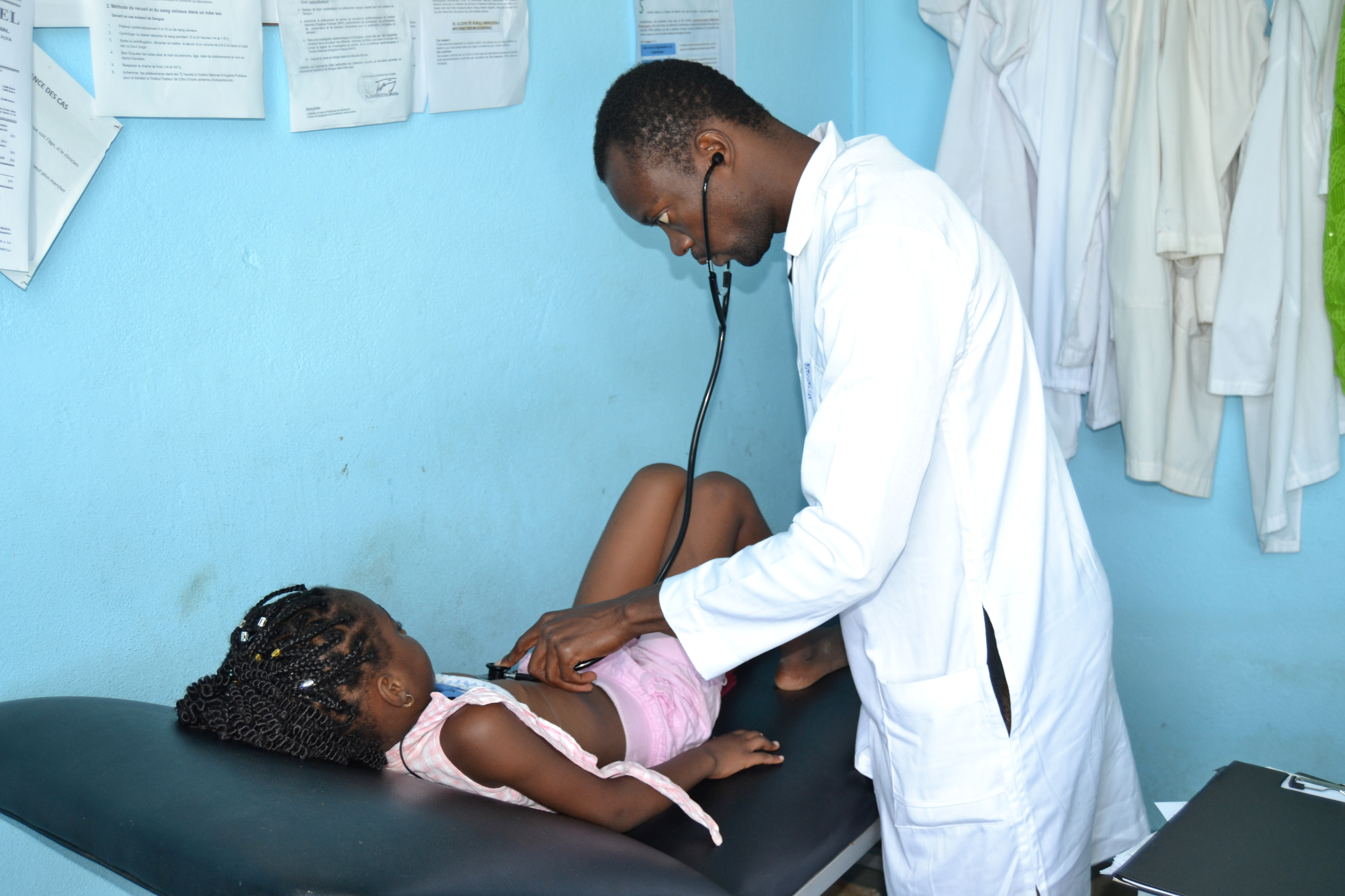 médecin généraliste auscultant quelqu'un dans un centre de santé à Abidjan This is an image of "African people at work" from Ivory Coast